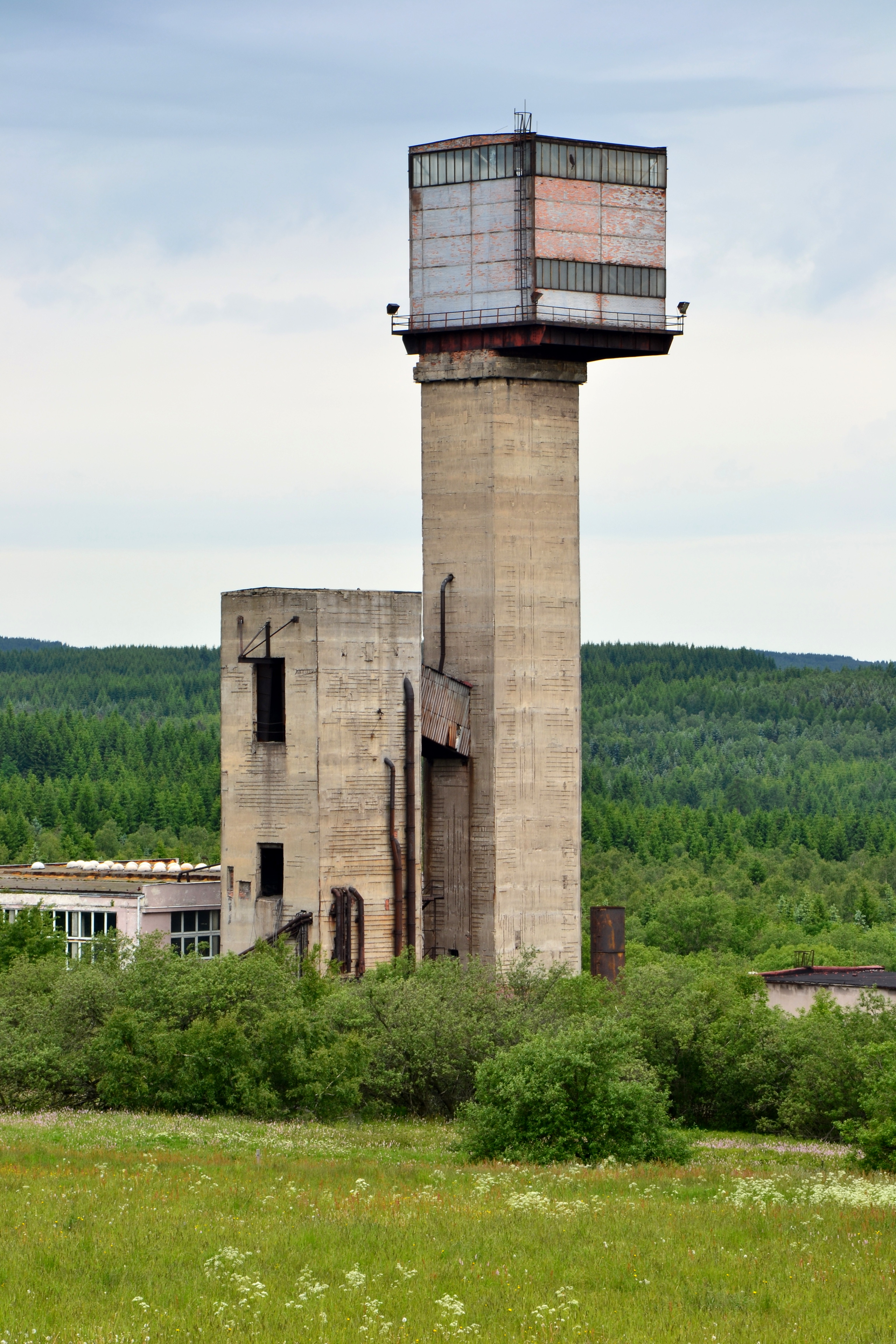 Důl Měděnec – skipová těžní věž na dopravu těživa ve skipové nádobě